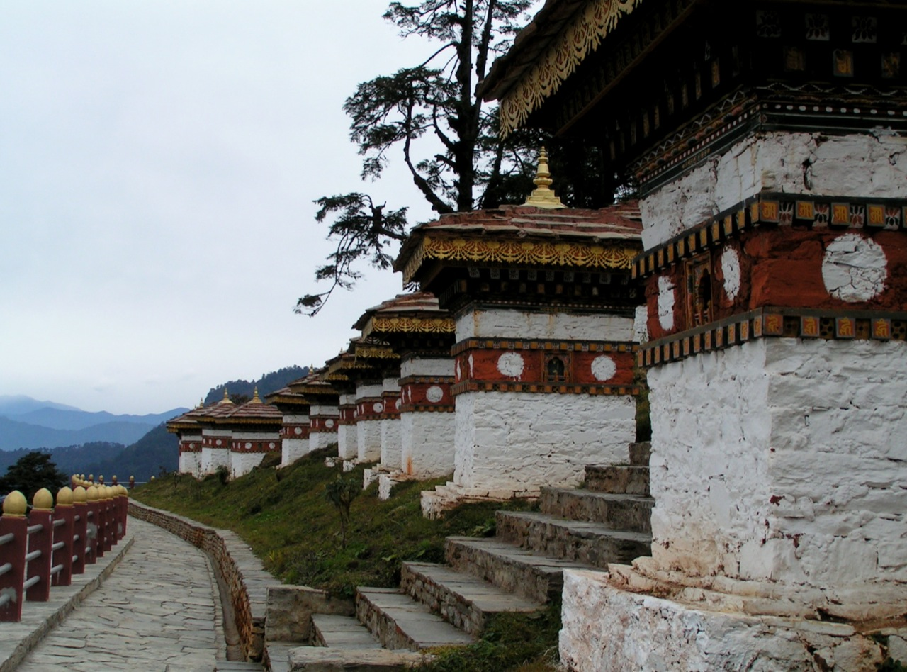 Chorten Dochu-La-Pass, Bhutan